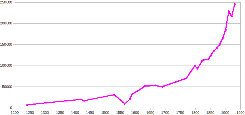 Malta's population (1240-1931).